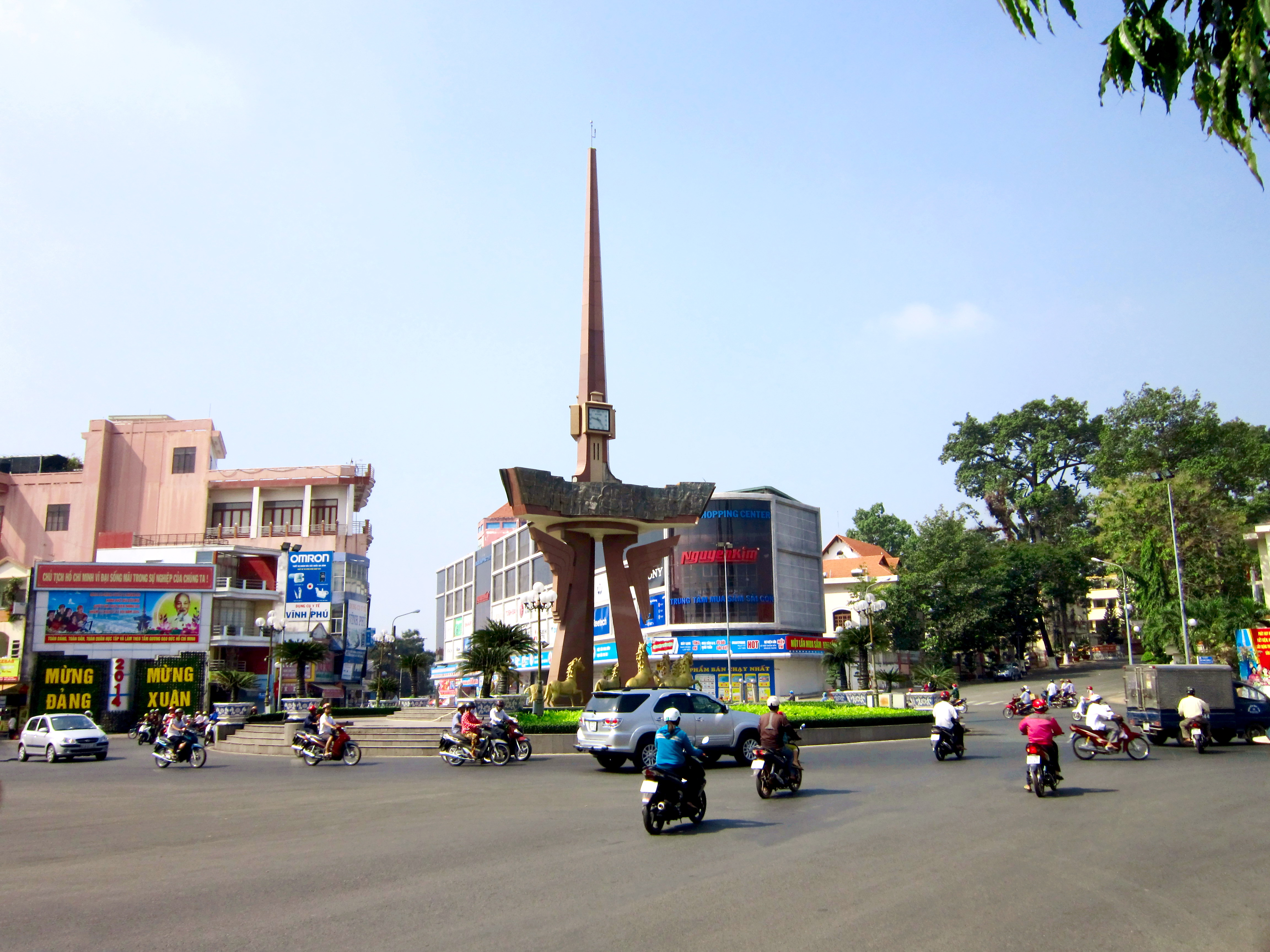 Tháp đồng hồ tại vòng xoay ngã 6 ở trung tâm TP. Thủ Dầu Một, tỉnh BÌnh Dương, Việt Nam.